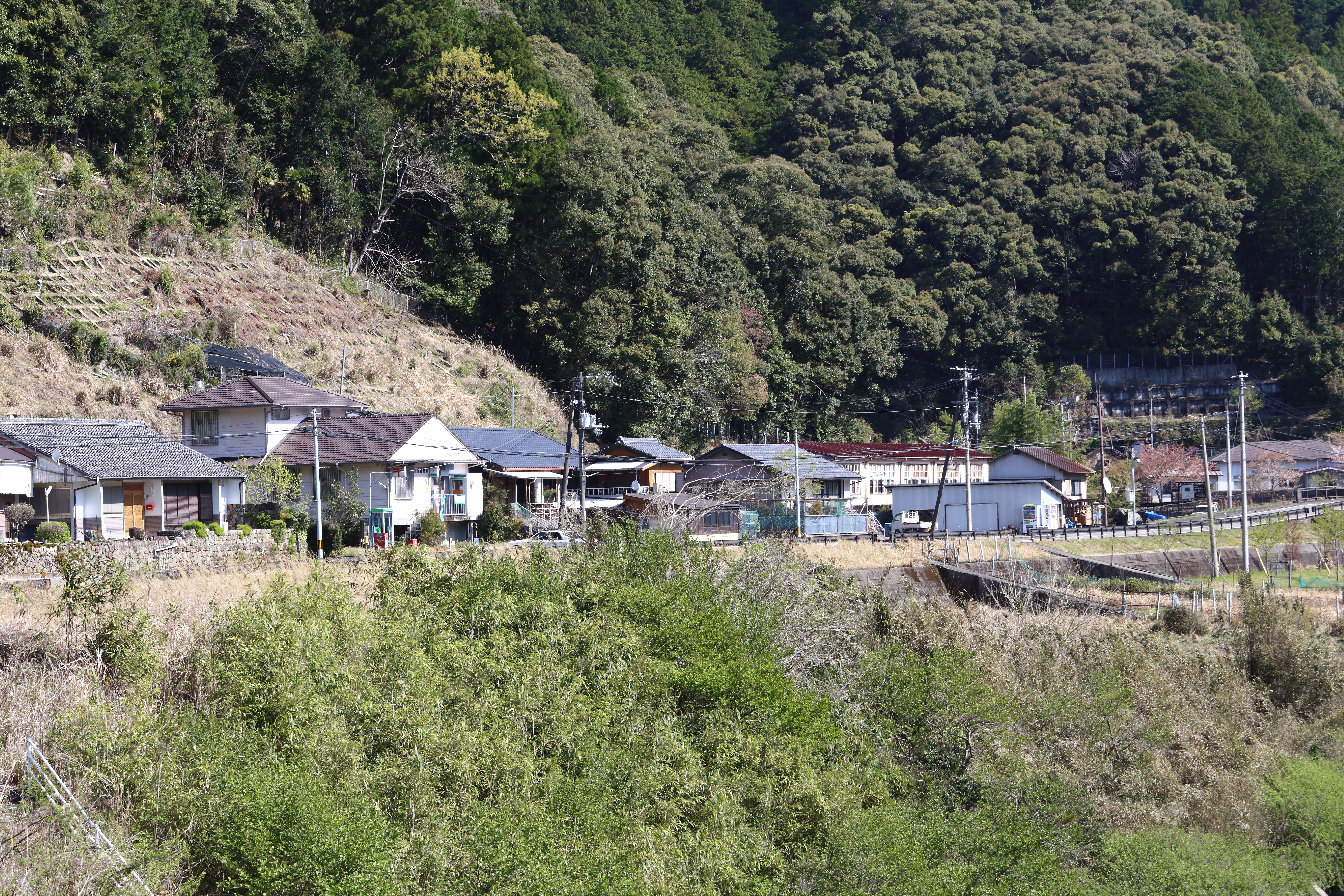 熊野川町九重の街並み 和歌山県新宮市熊野川町九重